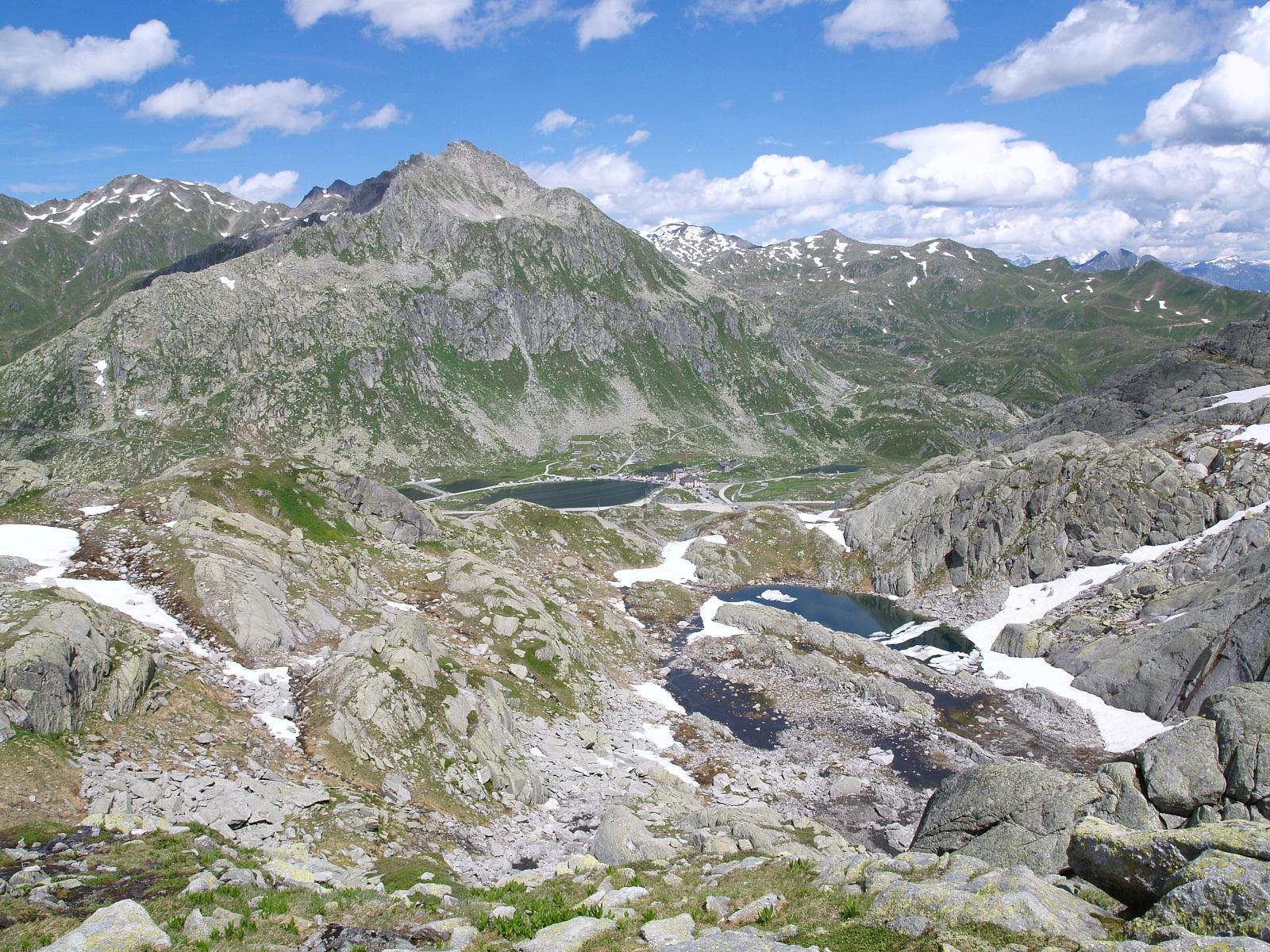 Gotthardpass 2008